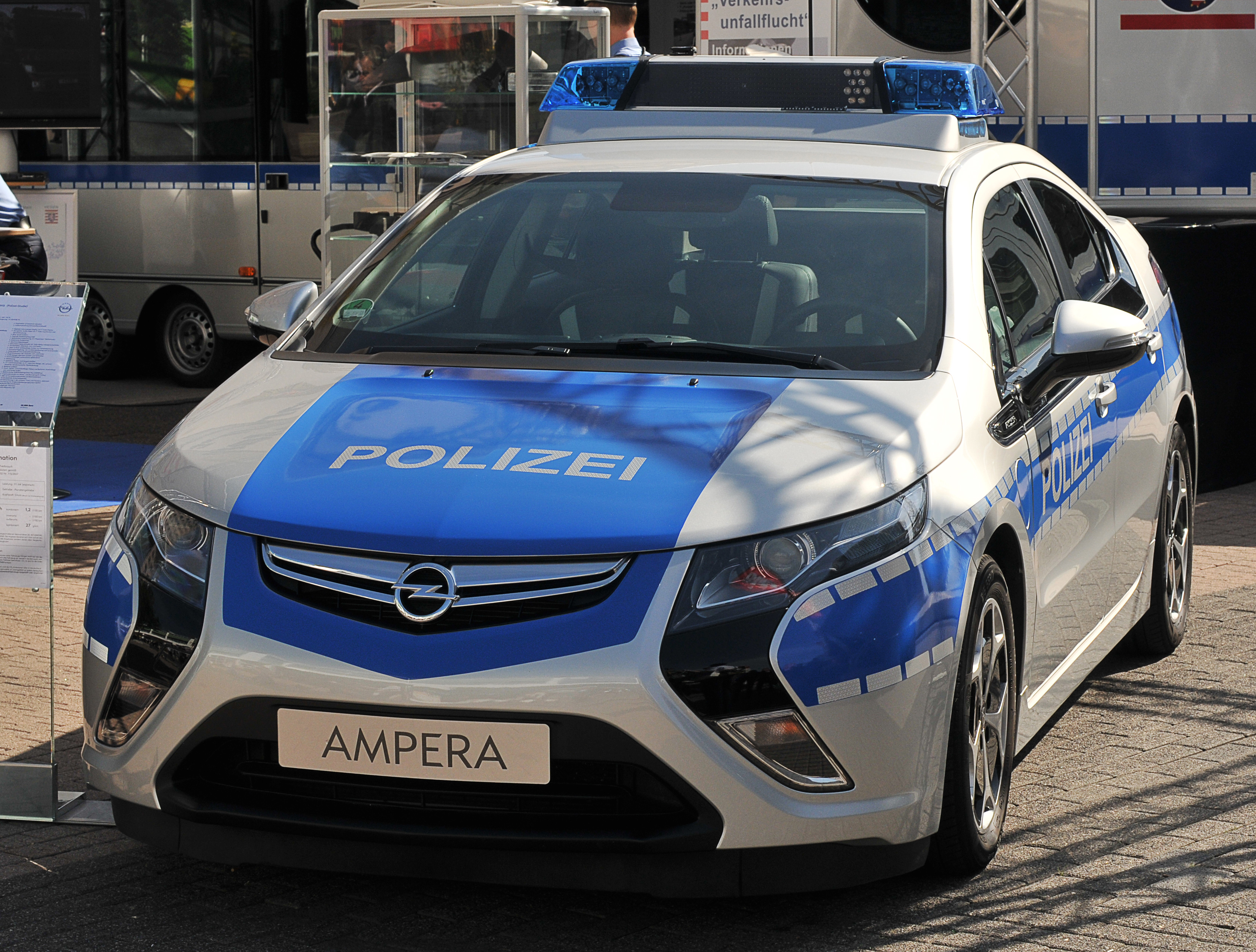 IAA 2011